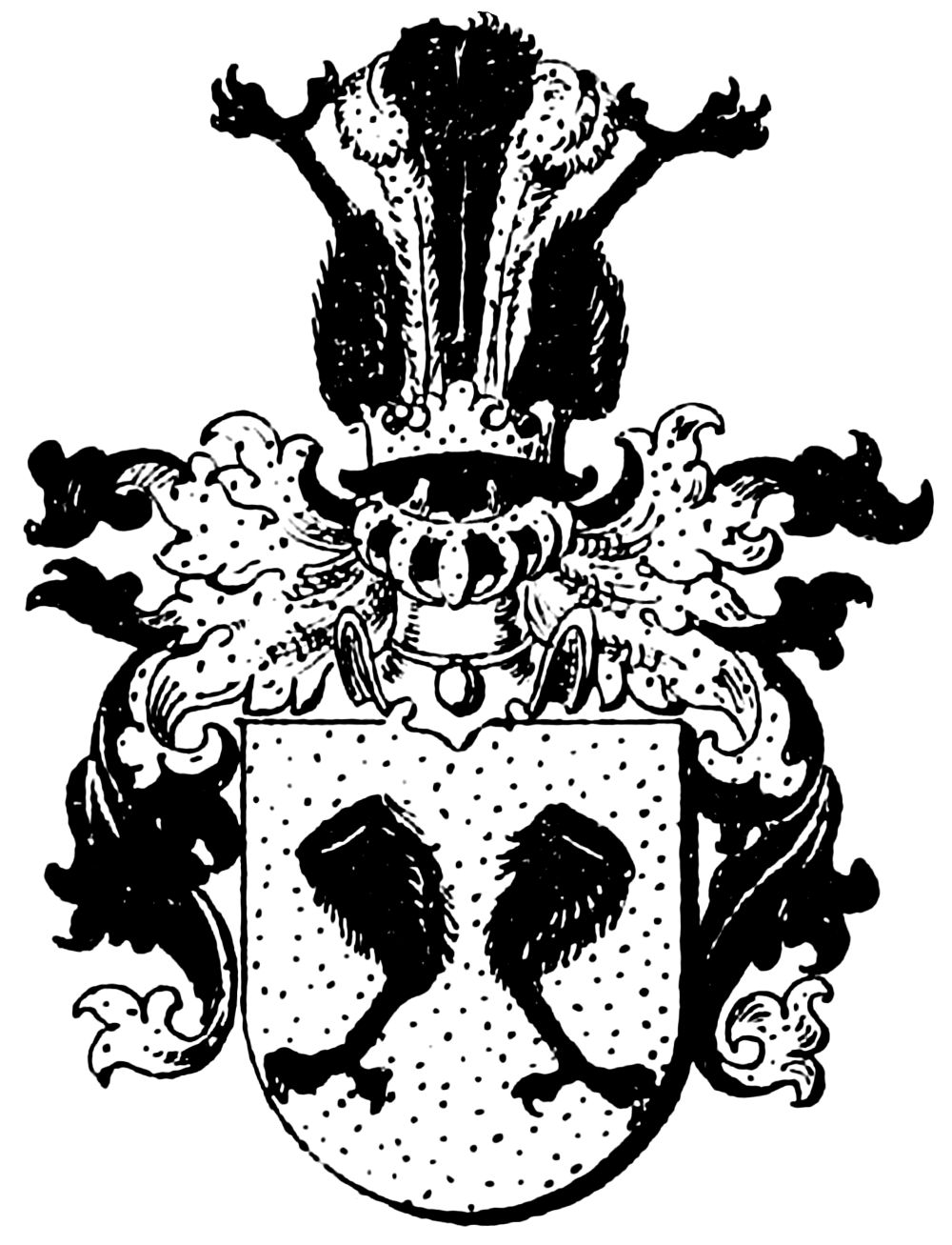 Wappen der "am Ende"